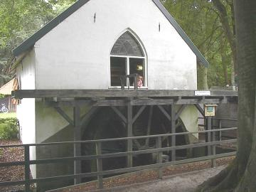 Watermolen bij Hattem